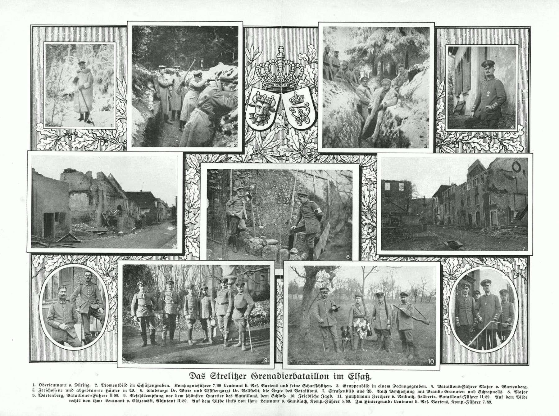 Grenadierregiment Nr. 89 im Elsaß